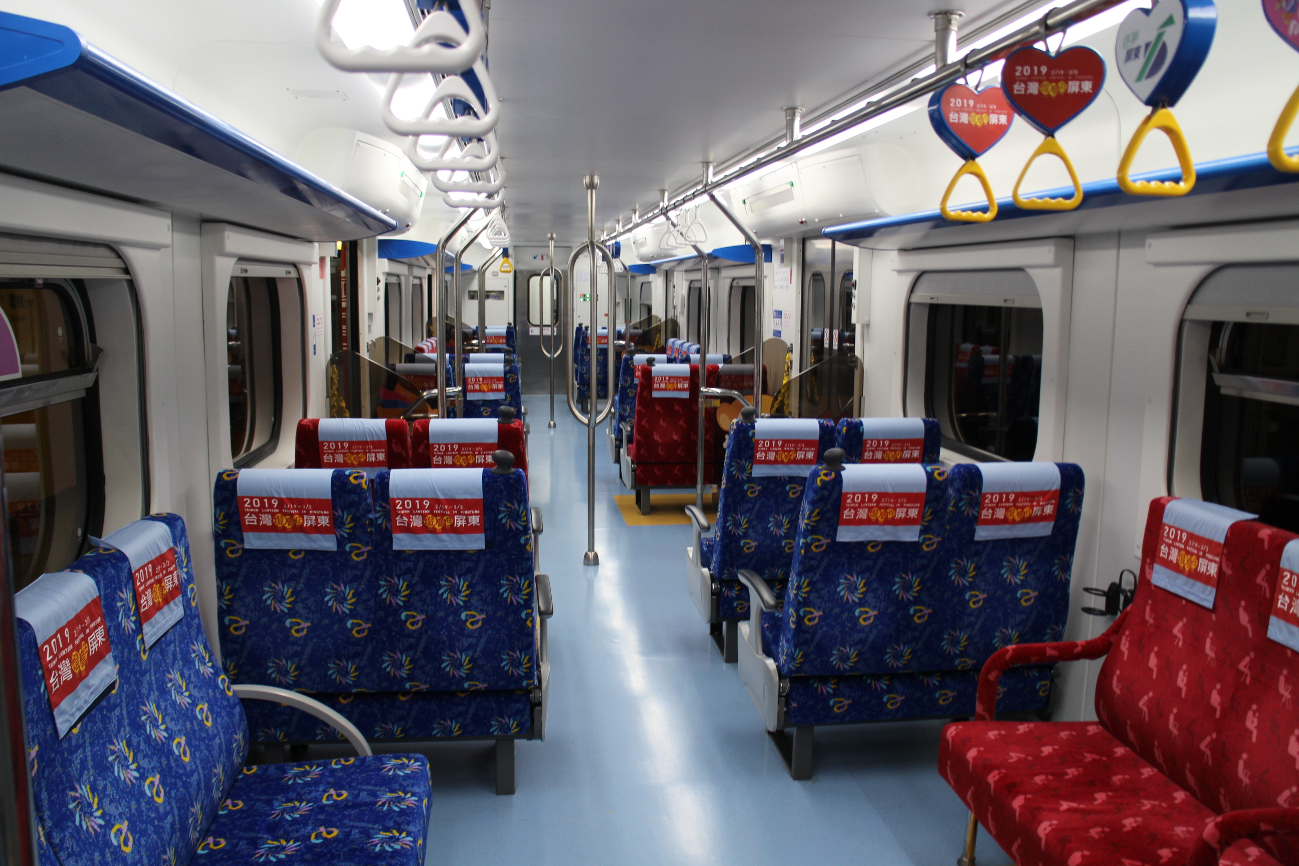 台湾鉄路管理局EMU500形電車 屏東仕様 車内